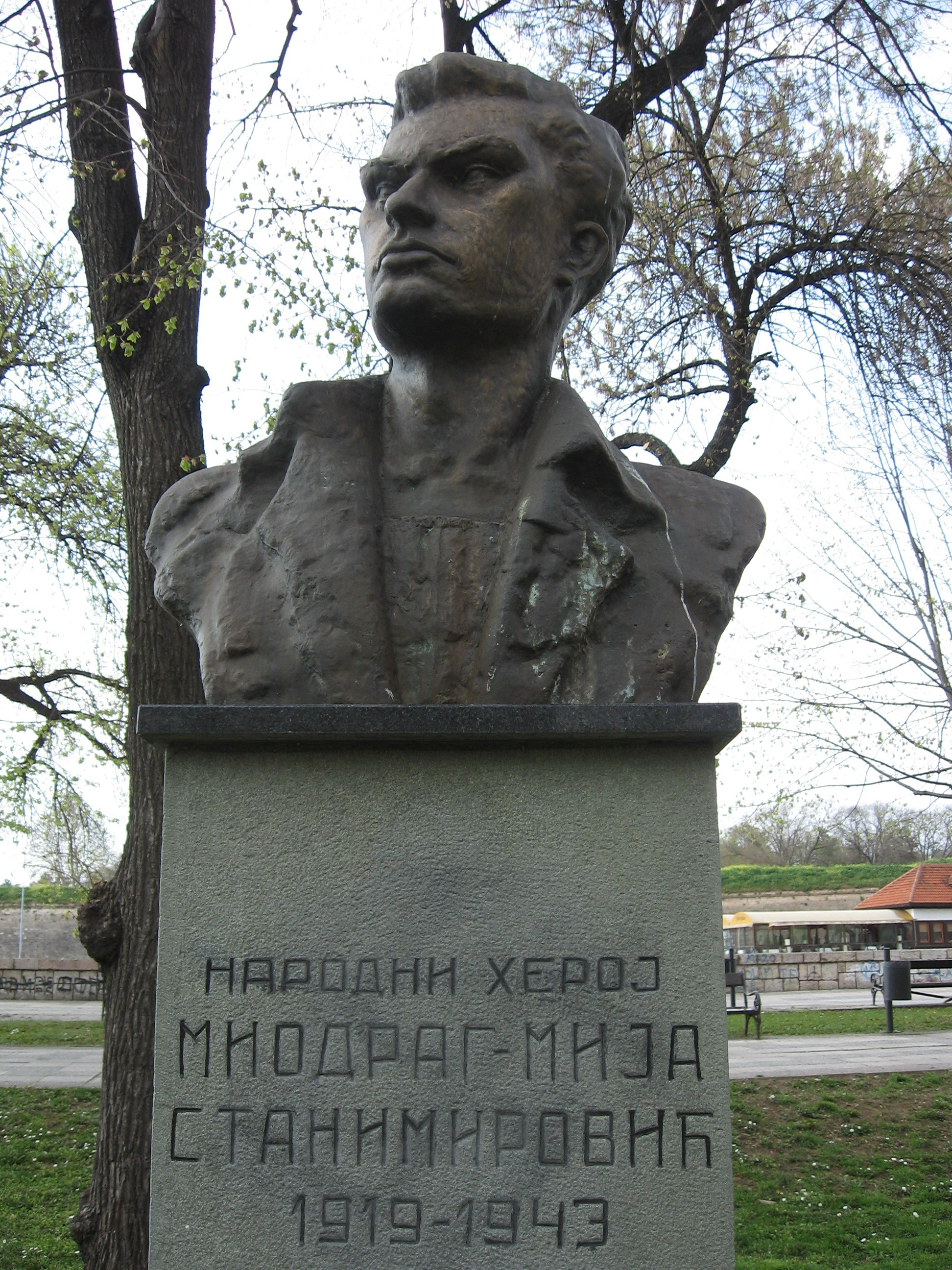 Bista Miodraga Mije Stamenkovića. Snimljeno u aprilu 2010.